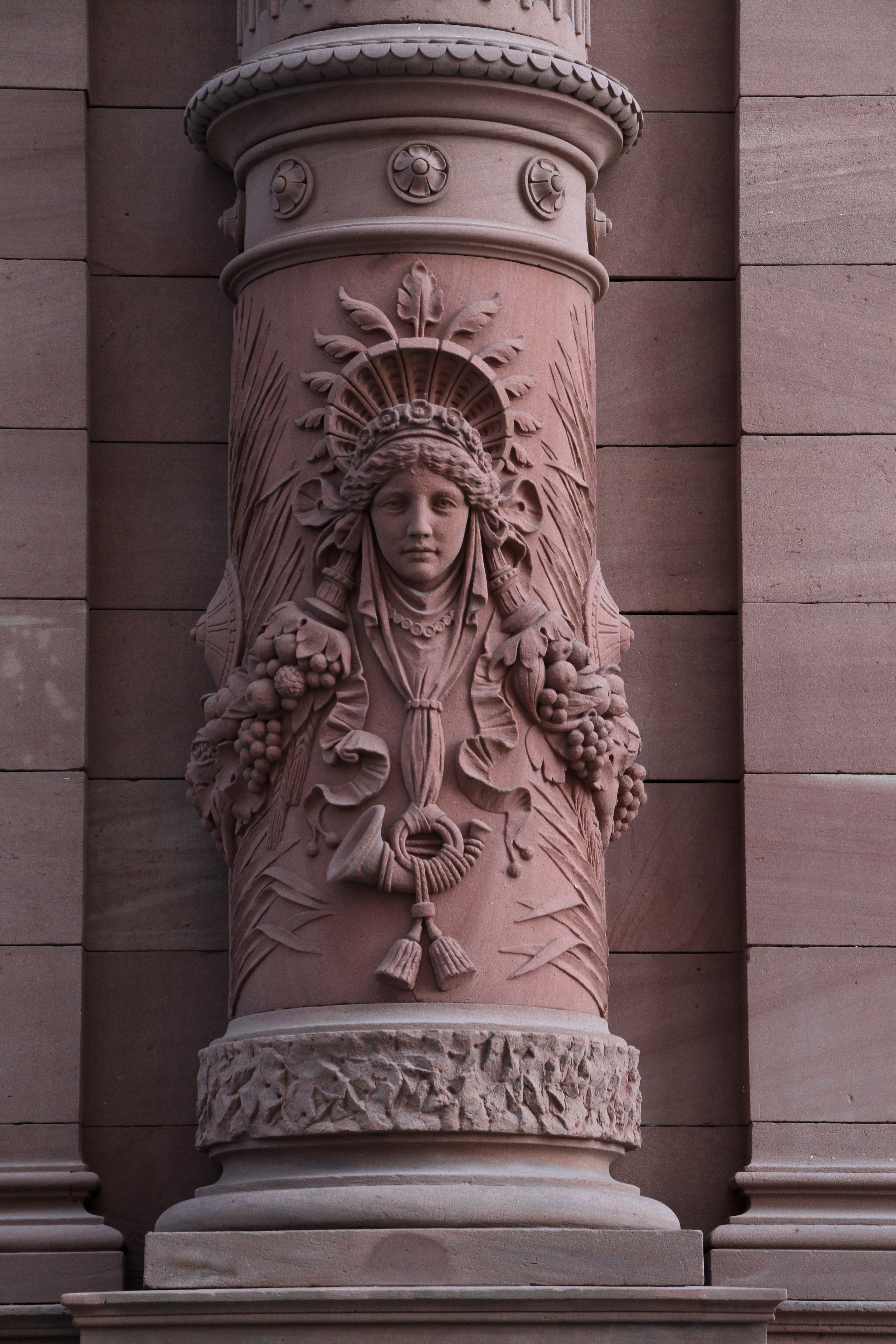 Ehemaliges Königlich-bayerisches Postamt; repräsentativer Neurenaissancebau, 1893. 2013 nach Umbau Nutzung als "Forum Alte Post".